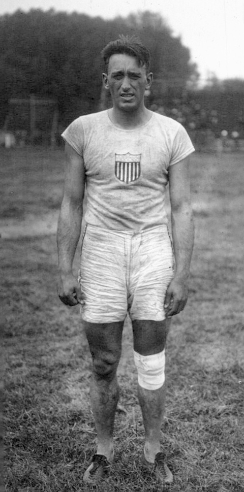 Wilson (U.S.A.) lancement du disque : [photographie de presse] / Agence Meurisse